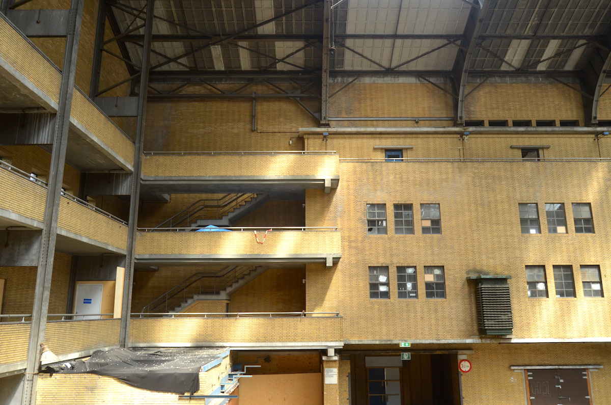 Centrale Markthal te Amsterdam-West - interieur (5); juni 2019. Foto: Erik Swierstra.